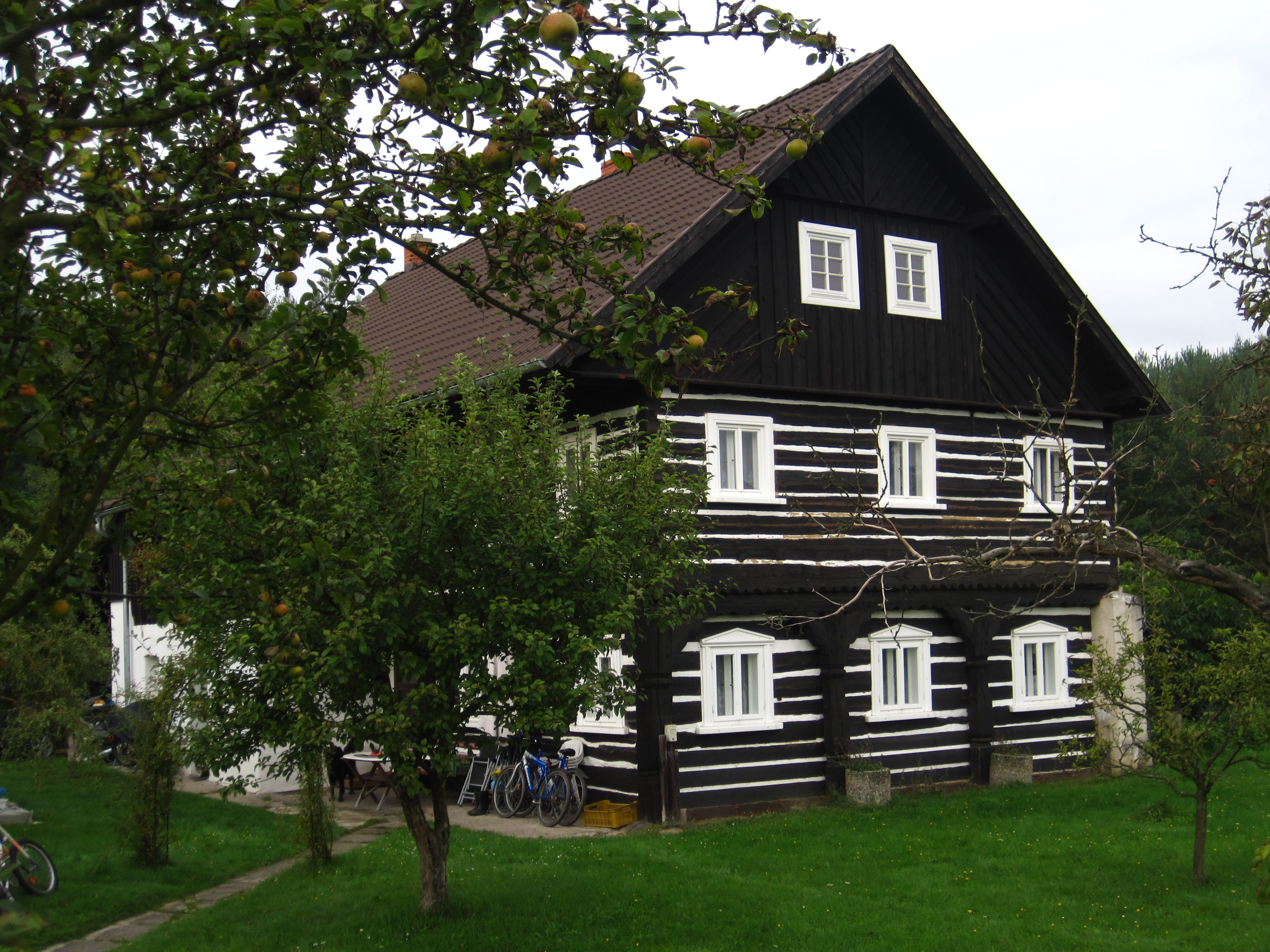 Usedlost čp. 23, Srní u České Lípy 23, Srní u České Lípy.